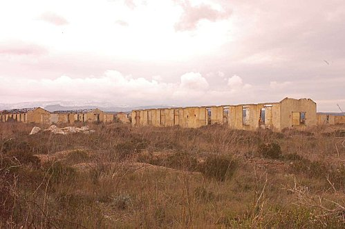 kamp Rivesaltes e kreisteiz Bro-C'hall